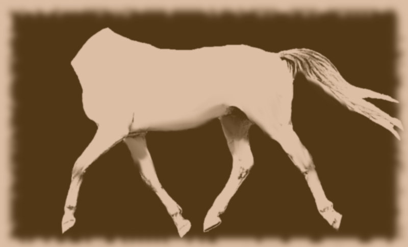 Cheval sans tête, tel que mentionné dans la légende de Cosges